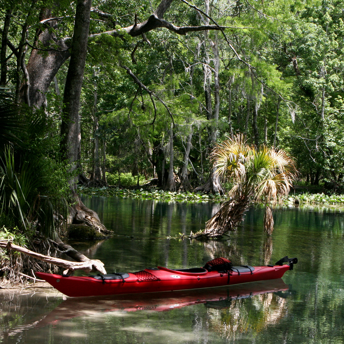 Prijon Seajak auf dem Silver River in Florida, 2009